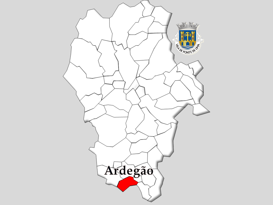 Censos 1864/2011